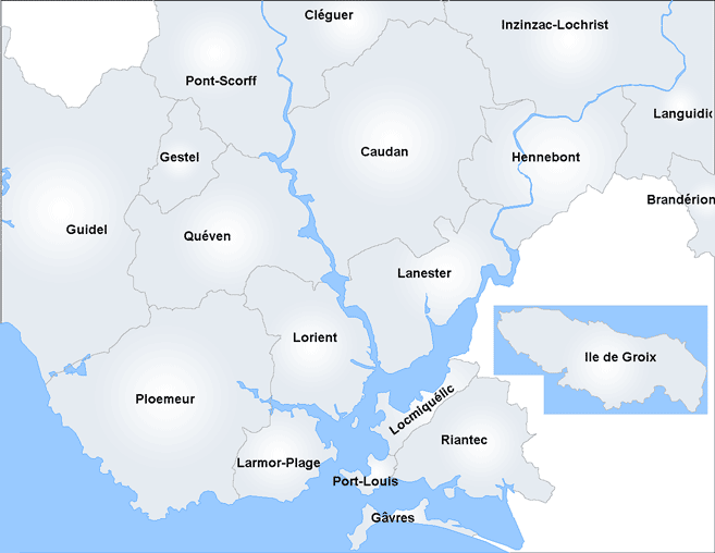 Description : Carte de la communauté d'agglomération du pays de Lorient (Cap L'Orient) Place : Bretagne, France Date : Août 2006 Author : Réalisation Pline